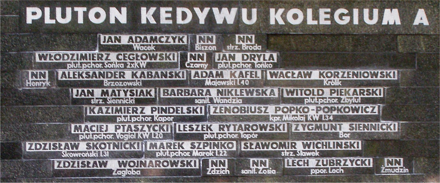 Powązki Wojskowe w Warszawie: Włodzimierz_Cegłowski